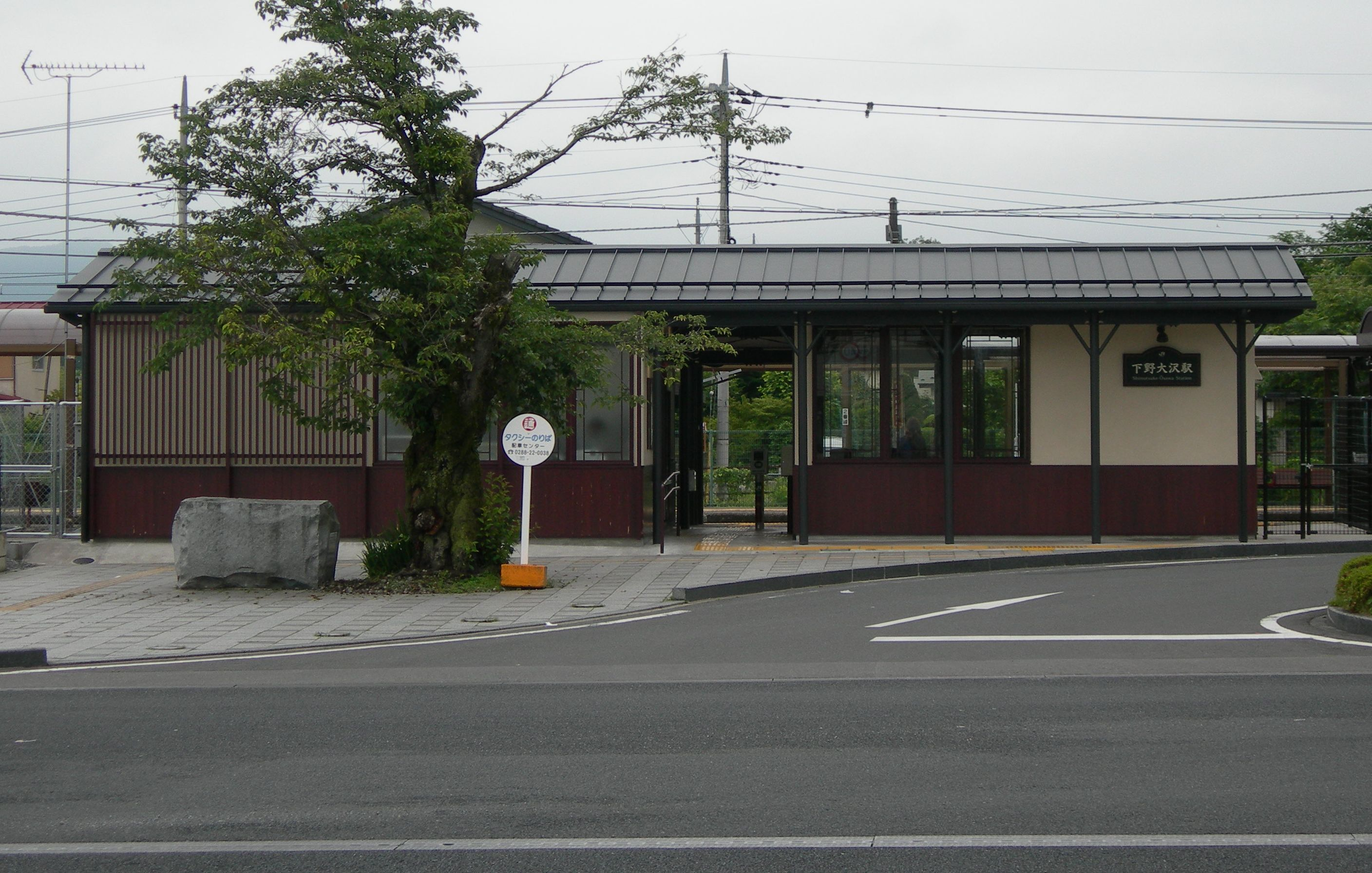 下野大沢駅駅舎